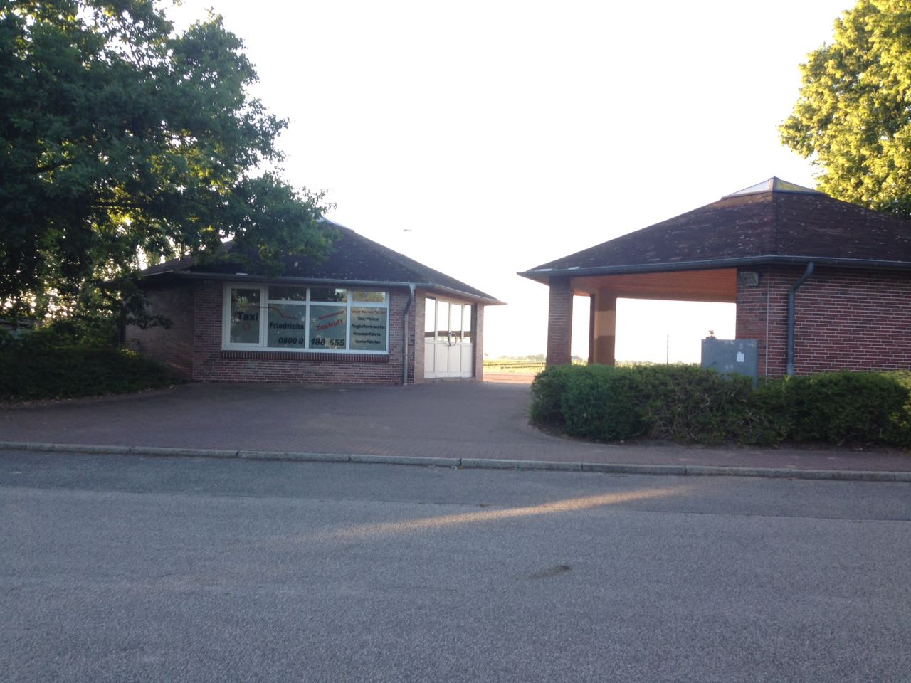 Eingang Bahnhof Wilster.